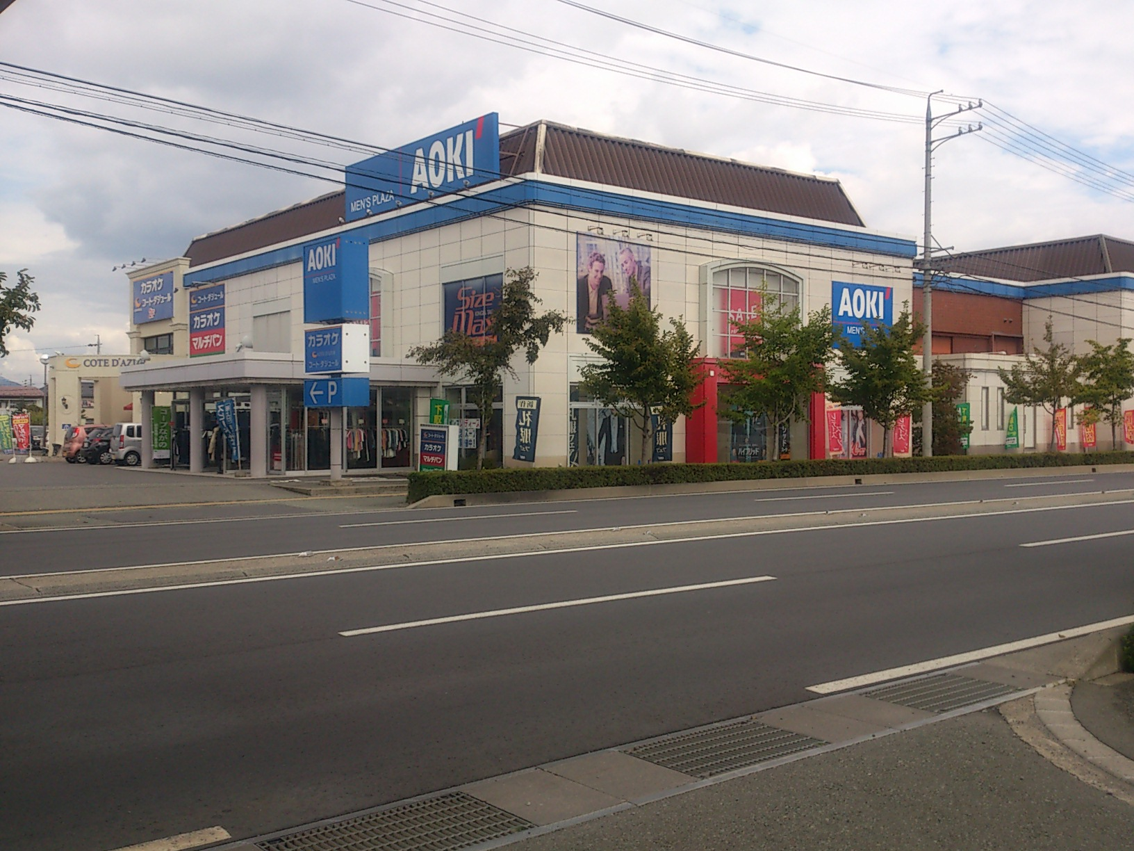 アオキ長野南高田店（長野県長野市南高田二丁目）